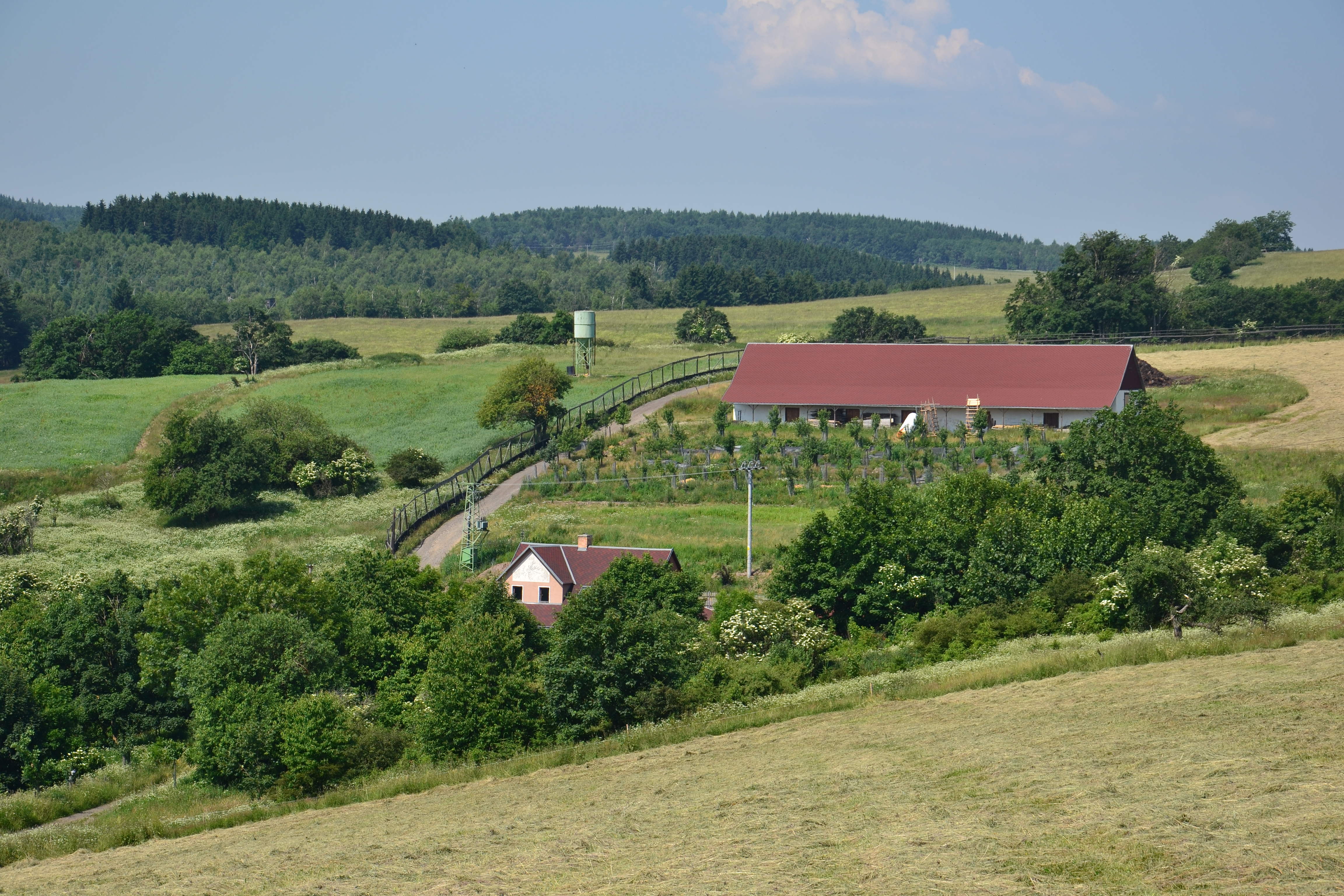 Celkový pohled na samotu